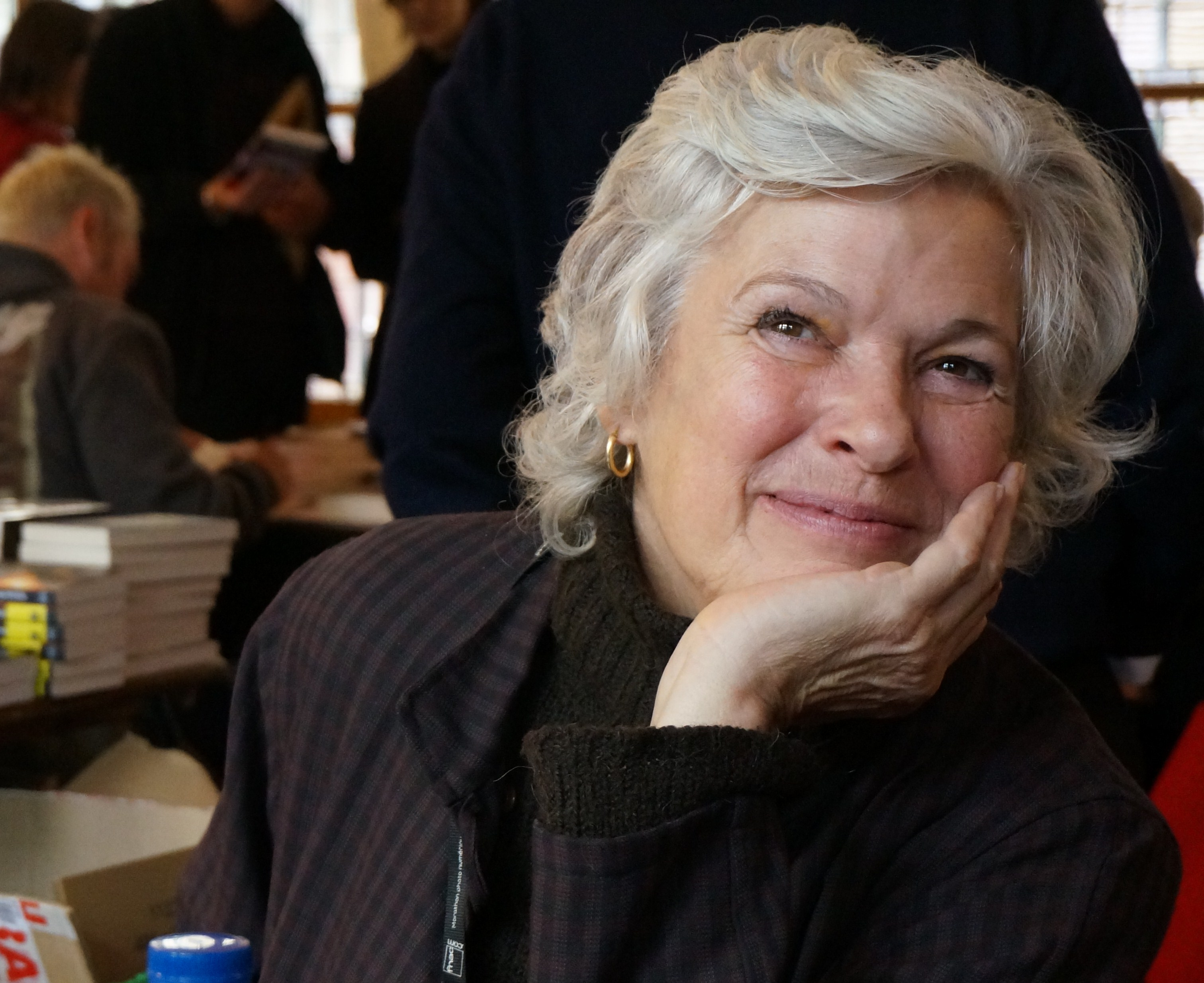 Sylvie_Granotier au festival Interpol'art .